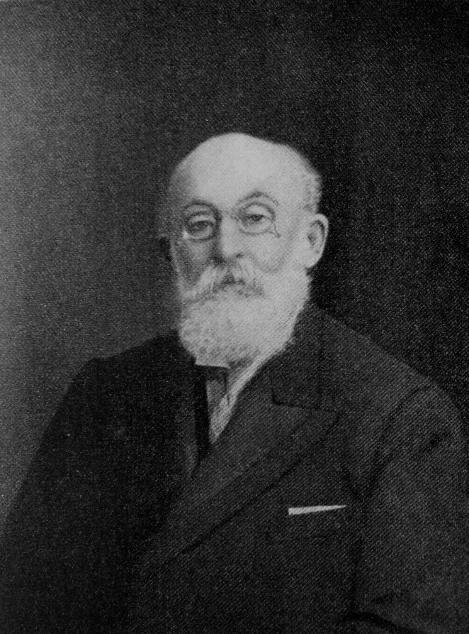 Josef Dürich (* 19. srpna 1847 Borovice – 12. ledna 1927 Klášter Hradiště nad Jizerou) byl český politik staročeské strany, později agrární strany, účastník československého zahraničního odboje za 1. světové války, dramatik a spisovatel. Na fotografii jako člen Národní rady a poslanec (nejspíše kdesi v Rusku.) Fotografie před rokem 1919. Autor není znám.